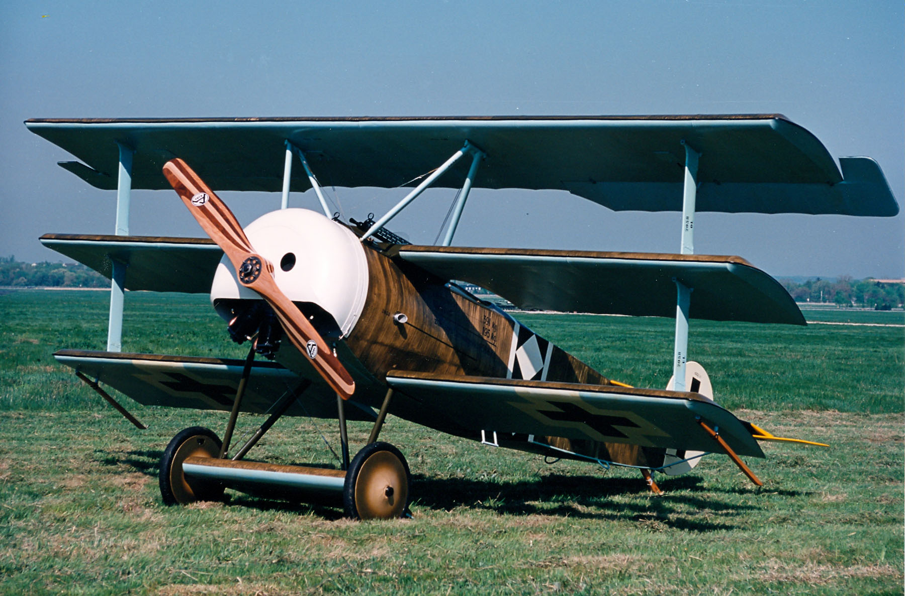 A Fokker Dr.I triplane.